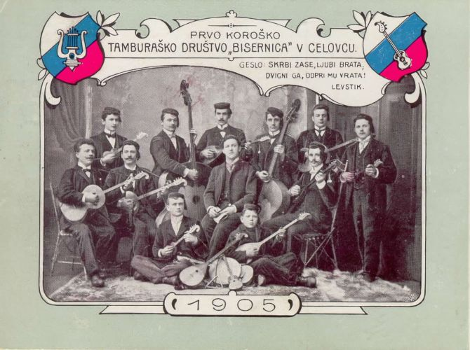 Prvo koroško tamburaško društvo Bisernica v Celovcu leta 1905